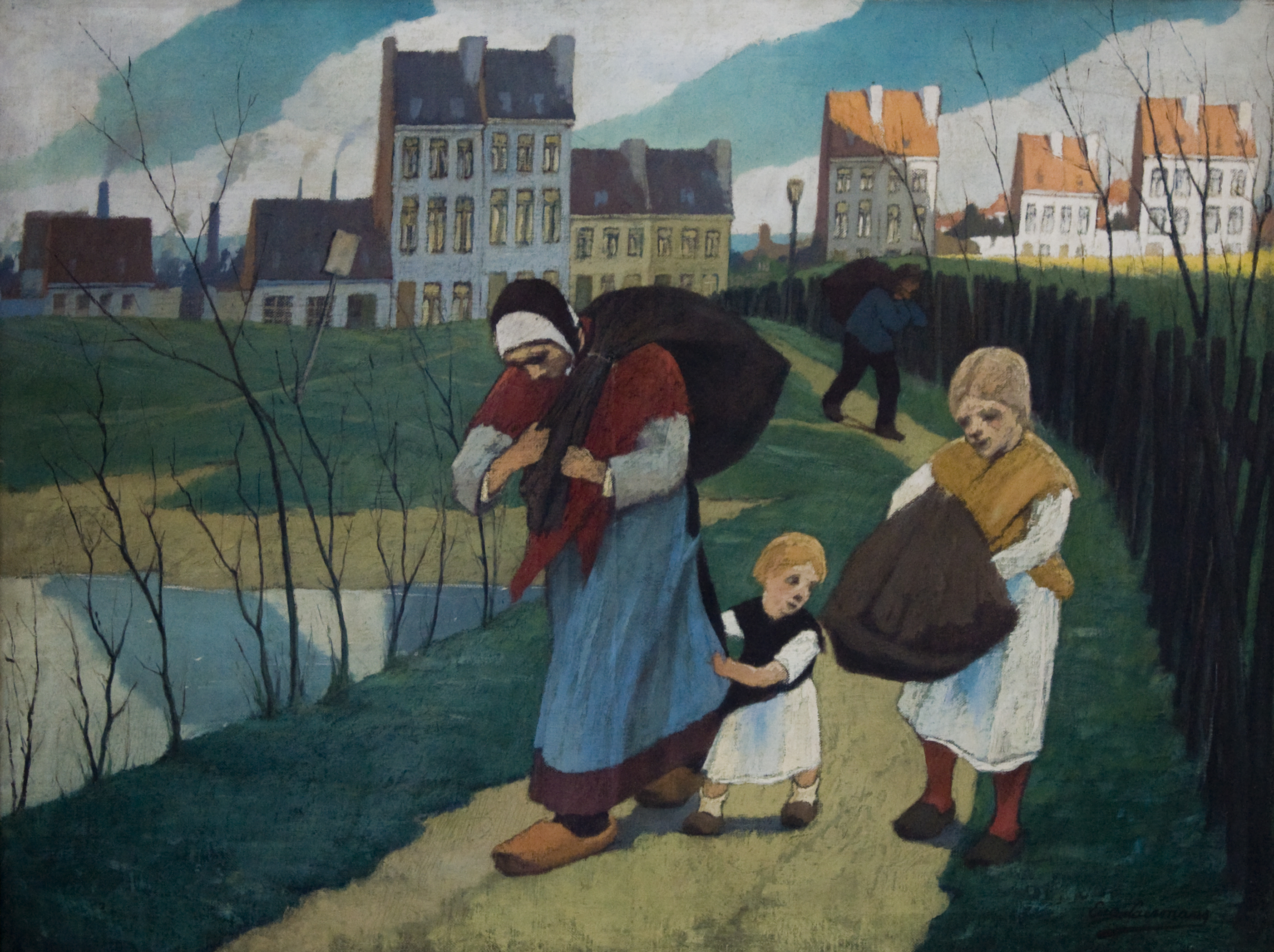 Eugène Laermans - De voddenrapers (1914) - in het Museum Dhondt-Dhaenens te Deurle, België